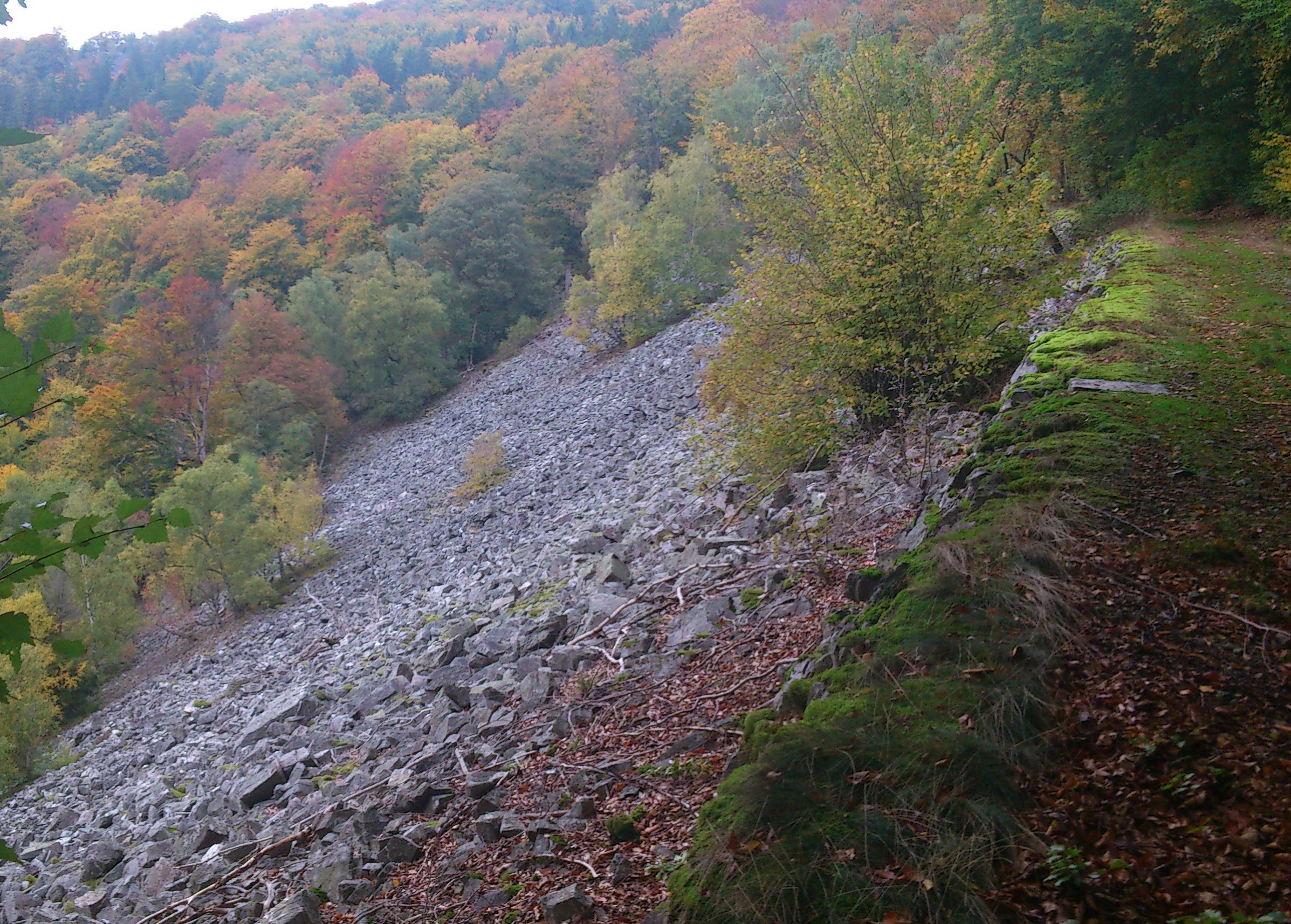 Inmitten der Rosselhalde laufen gewundene Wege, so alt wie Ihre frühen Bewohner, die Kelten und Römer. – Die rund 1 km nördlich von Kirschweiler liegende Rosselhalde im ehemaligen Preußischen Forstamt Kempfeld, Kreis Bernkastel, und im ehemaligen Preußischen Forstamt Herrstein, Kreis Birkenfeld ist das Naturschutzgebiet 7134-084 Rosselhalde im Landkreis Birkenfeld in Rheinland Pfalz im zukünftigen Nationalpark Hunsrück.